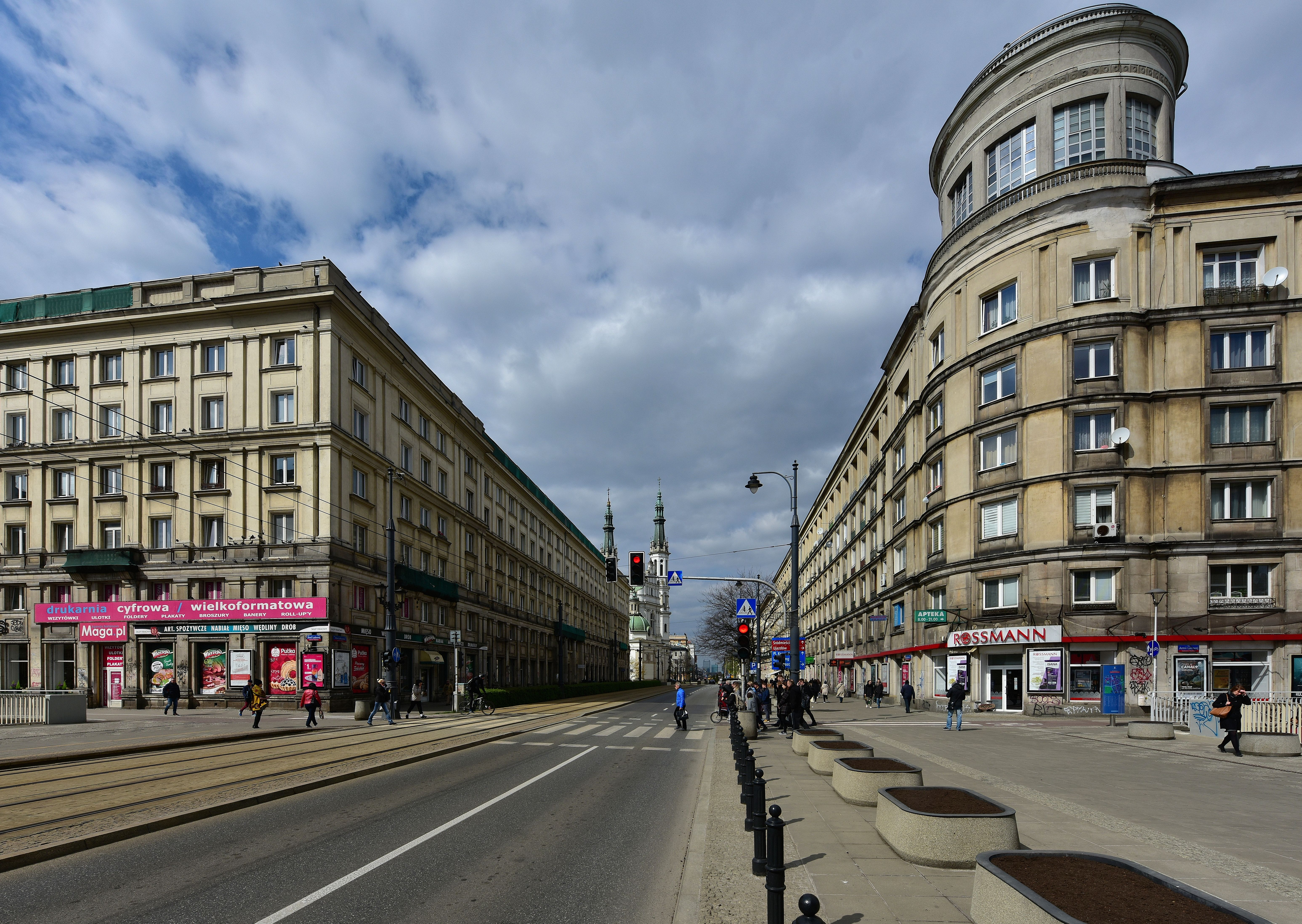 Ulica Marszałkowska przy al. Armii Ludowej w Warszawie